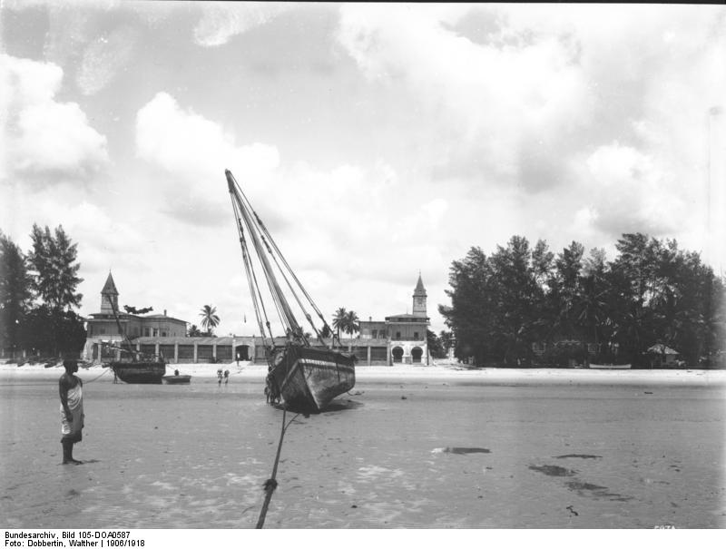 Bagamojo. Zollgebäude